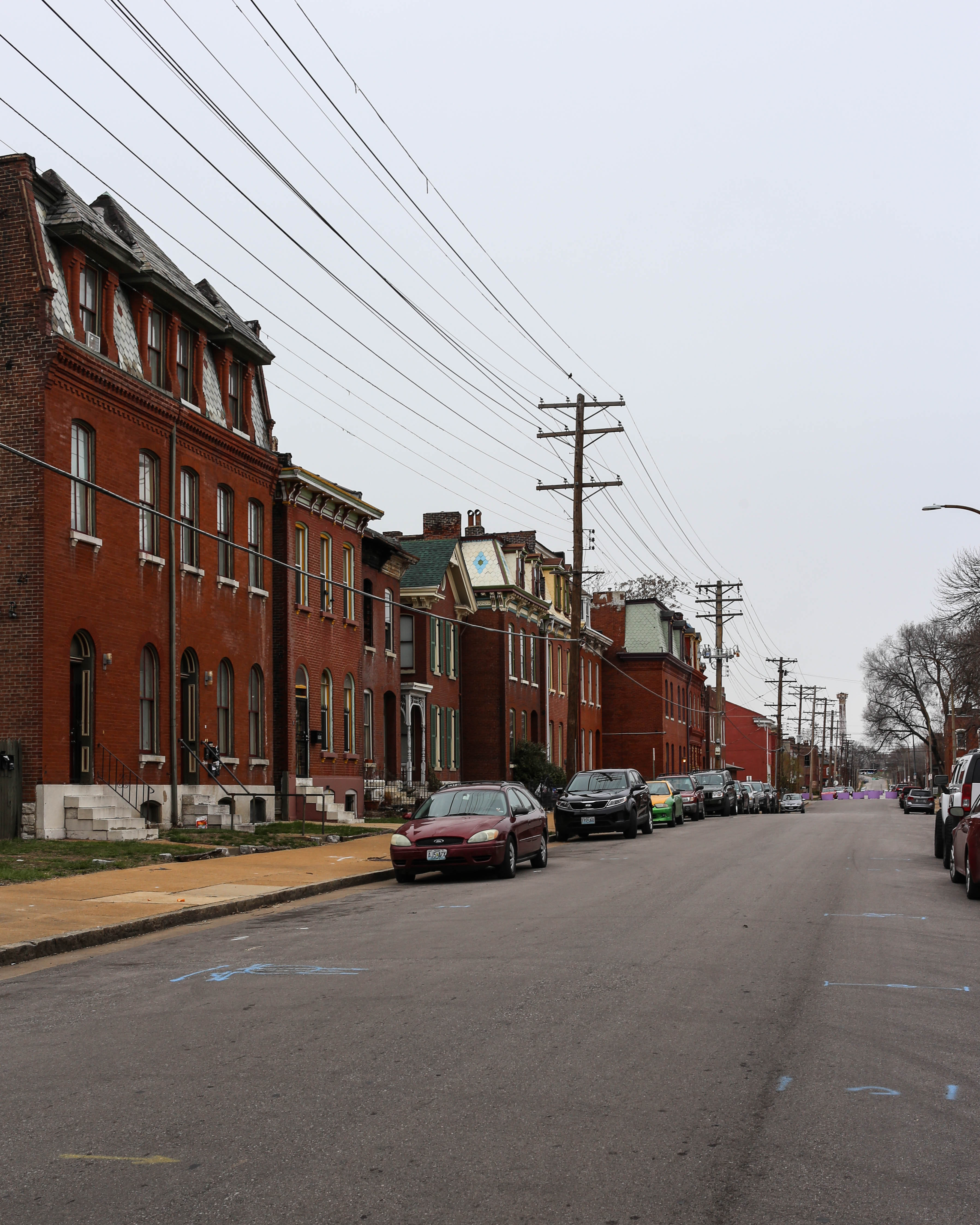 Hyde Park